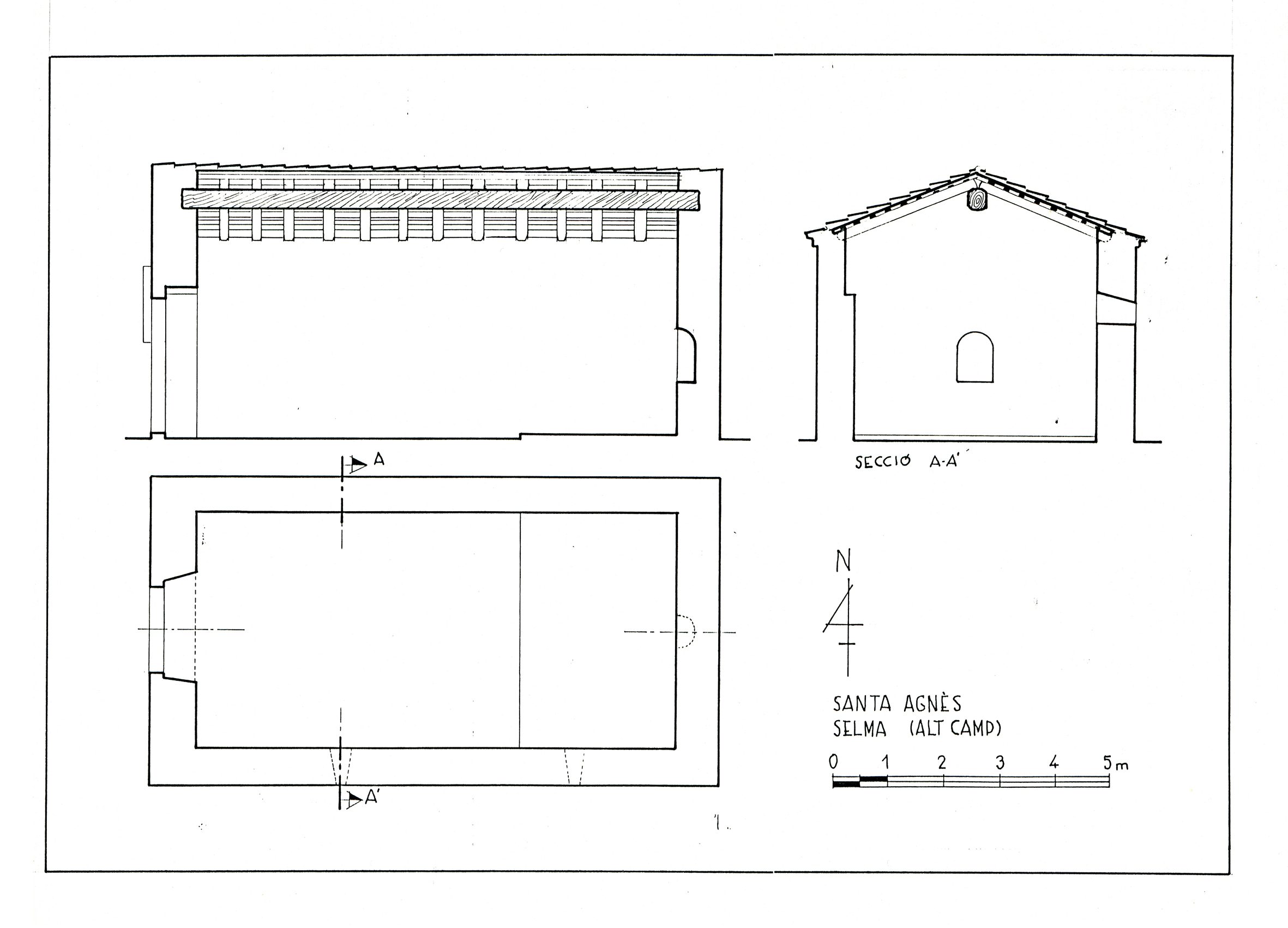 Selma. Capella del mas de Sta. Agnès. Planta i seccions. Dib. J. Fuguet.